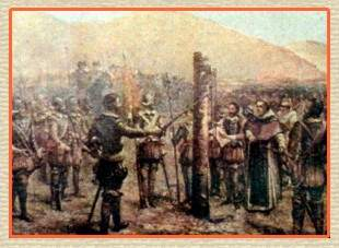 La fundación de la ciudad de Salta, en el noroeste de Argentina.